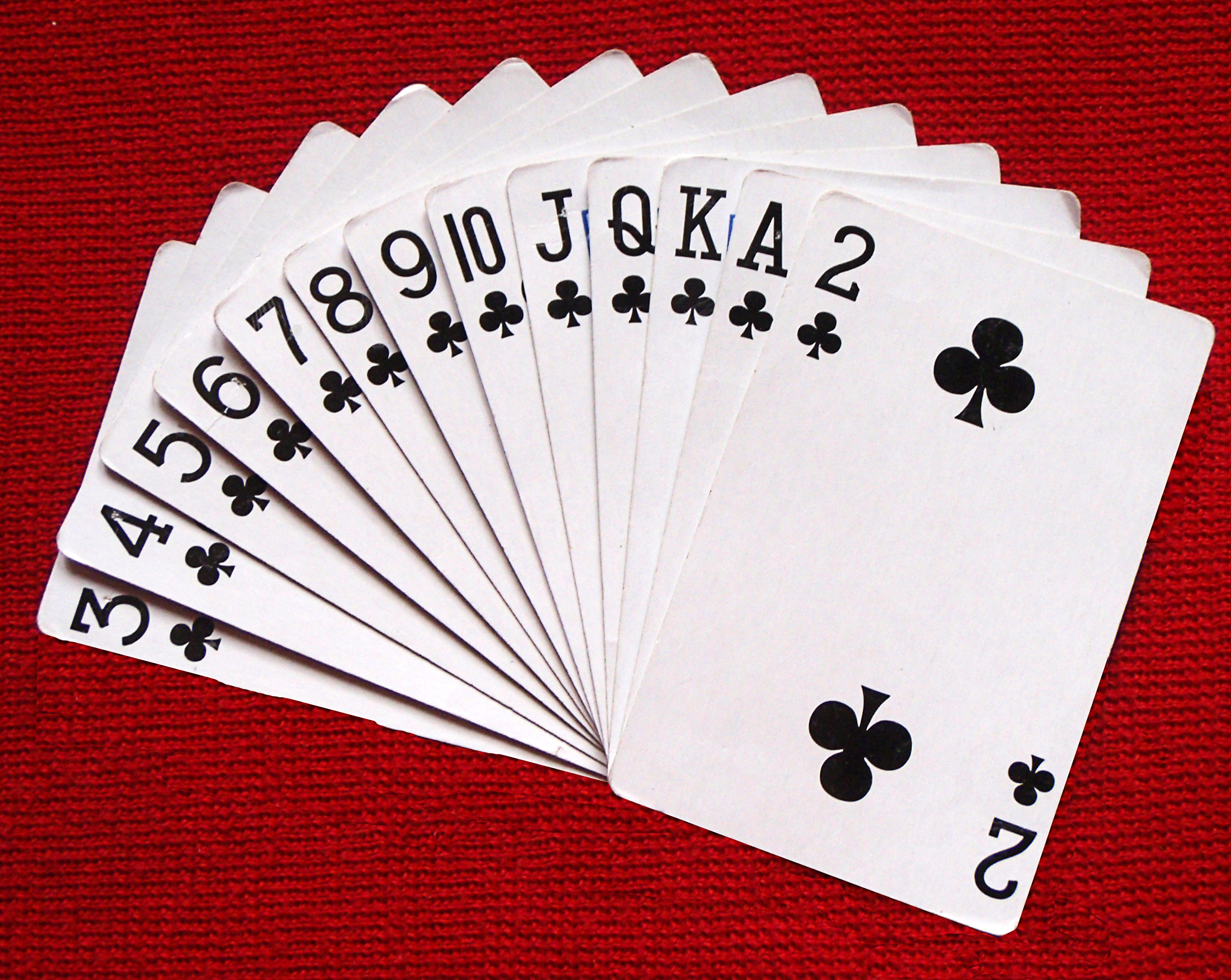 Trong trò chơi Bài tiến lên, thứ tự mạnh dần từ trái sang phải.